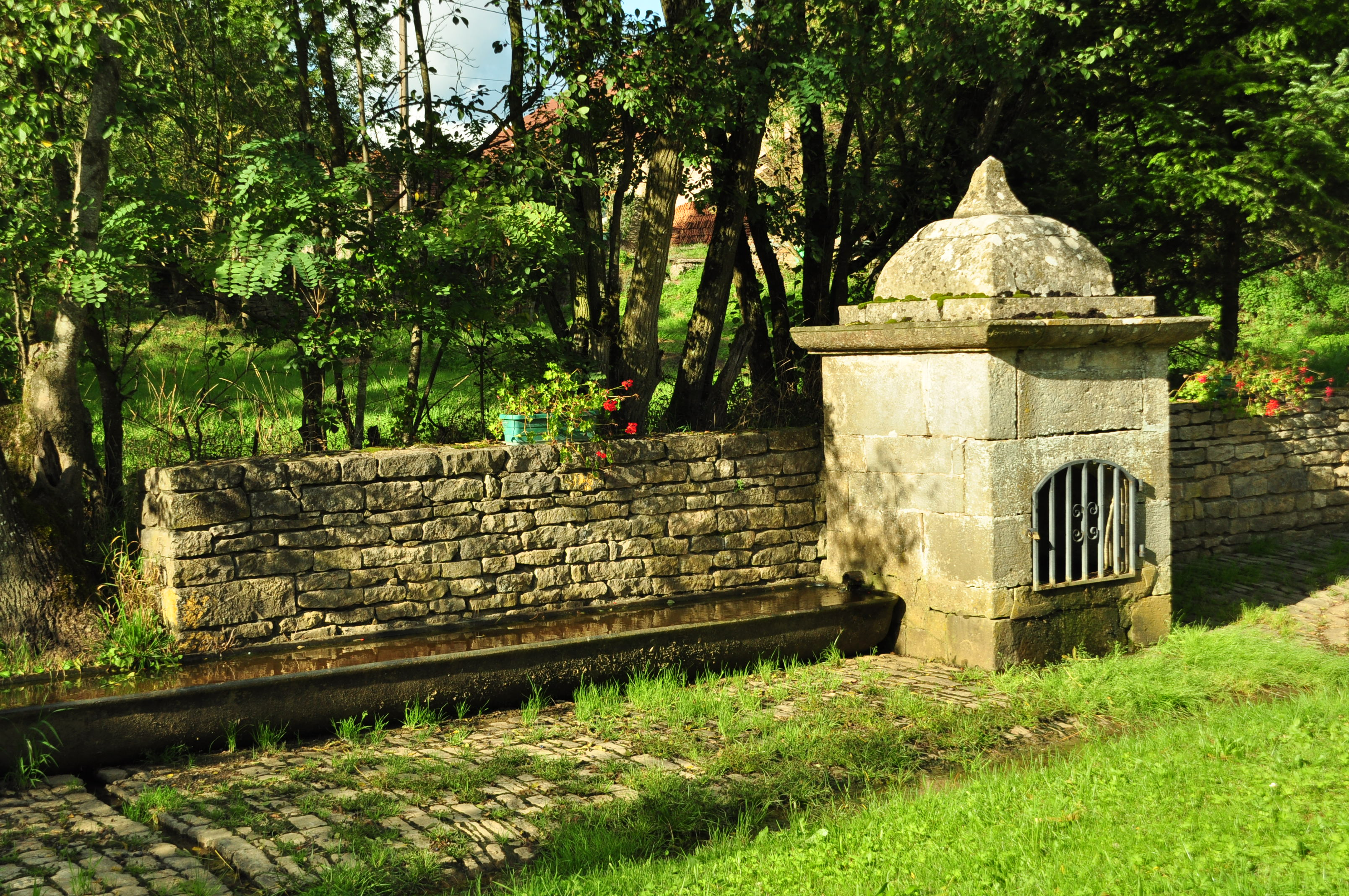 Lavoir Buriot .